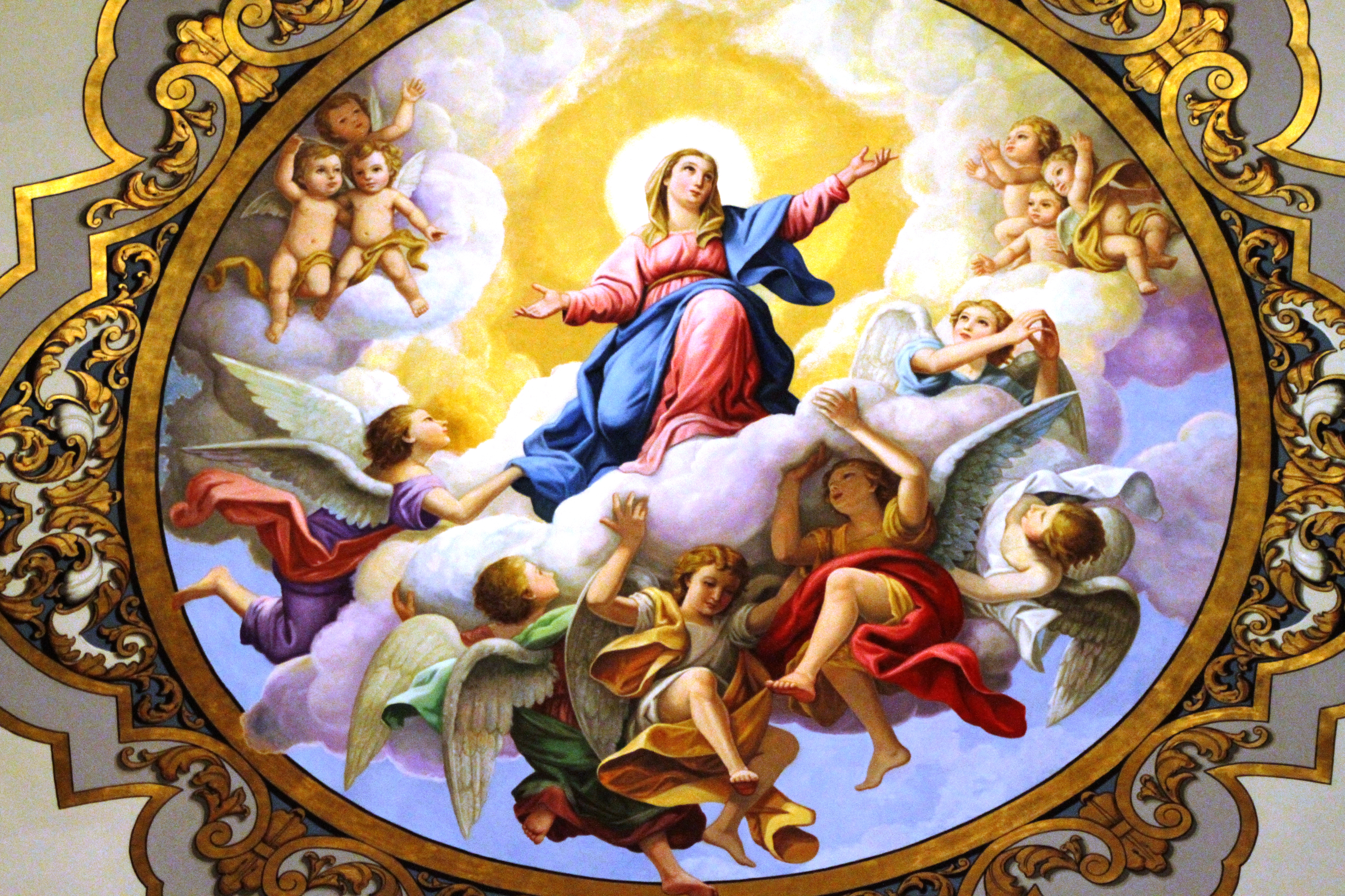 Assunção de Maria